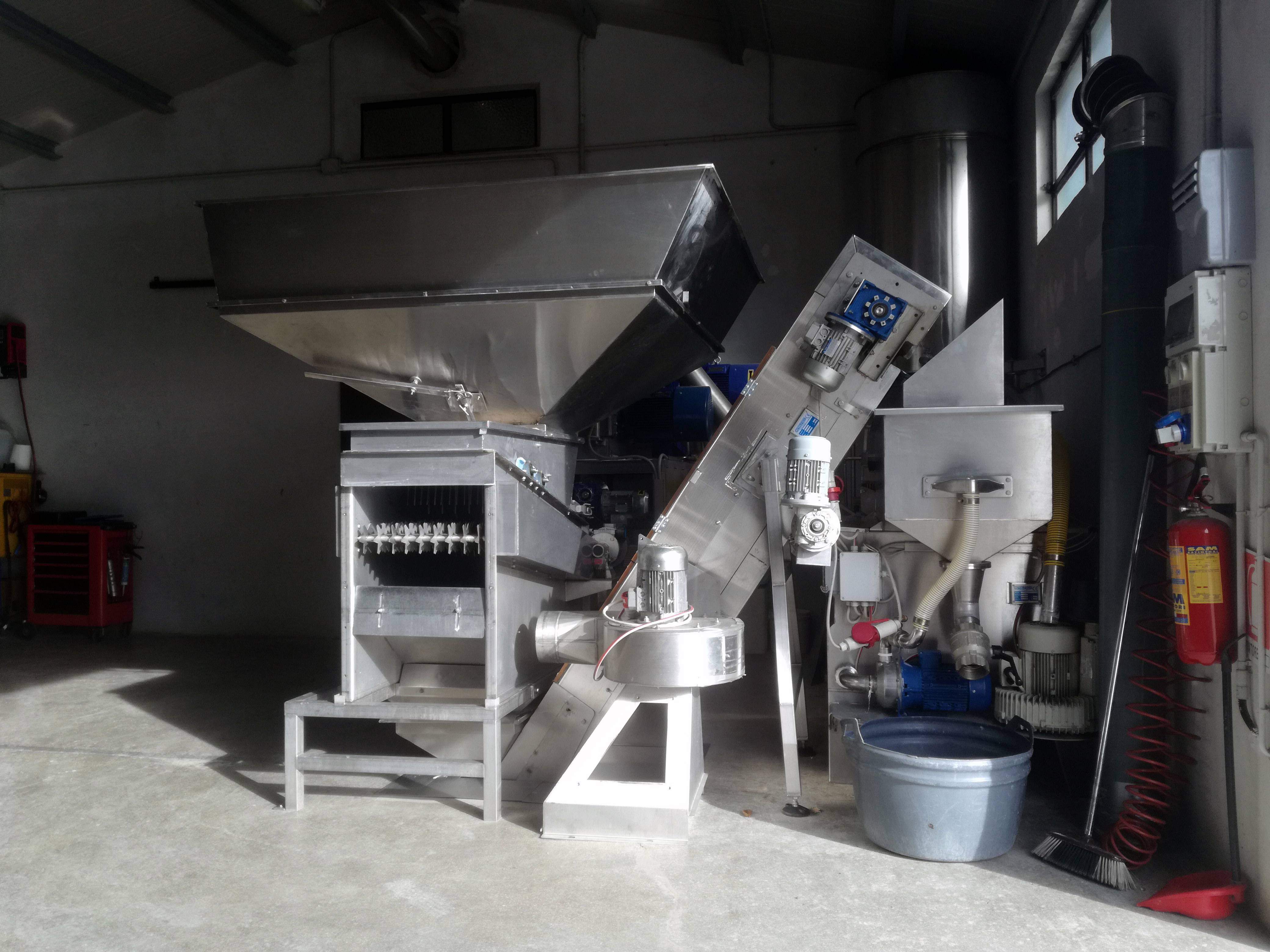 Macchina defogliatrice, dove vengono inserite le olive raccolte ancora in forma grezza, con possibili residui di foglie e rametti. Frantoio Masciantonio, dove si produce l'olio e.v.o. D.O.P "Trappeto di Caprafico".